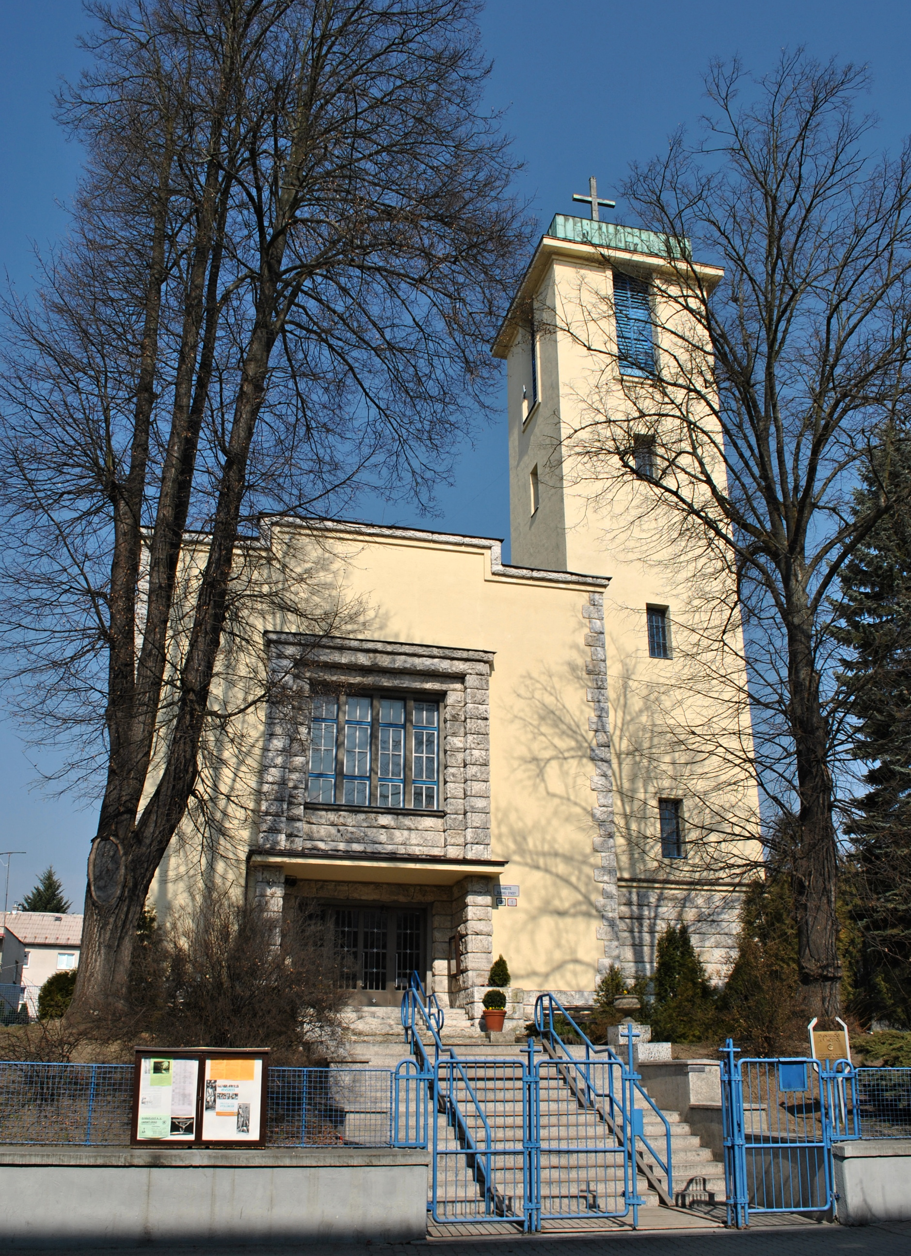 Kostol